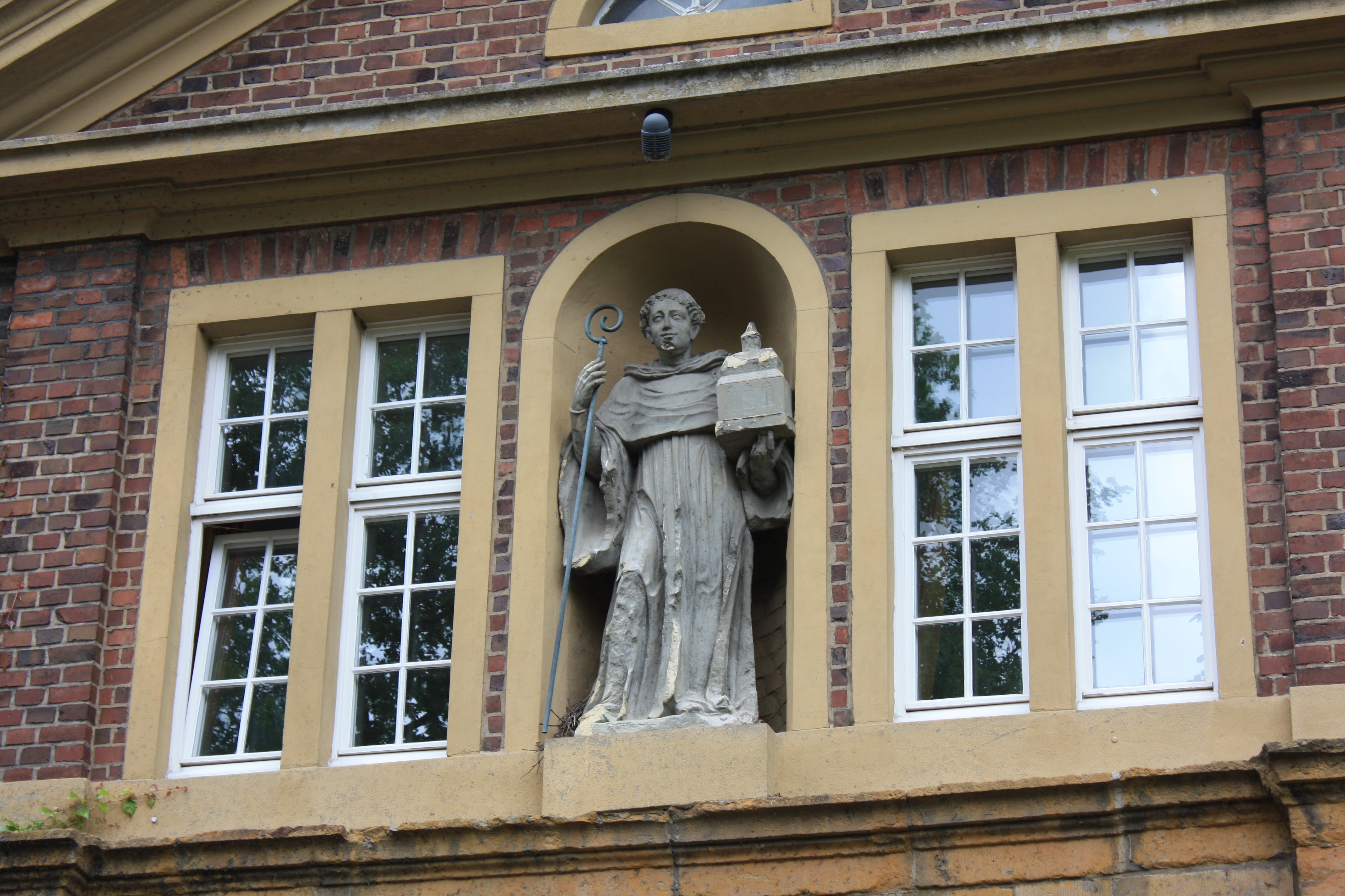 Robert von Molesme im Torhaus des Klosters Marienfeld, Innenseite